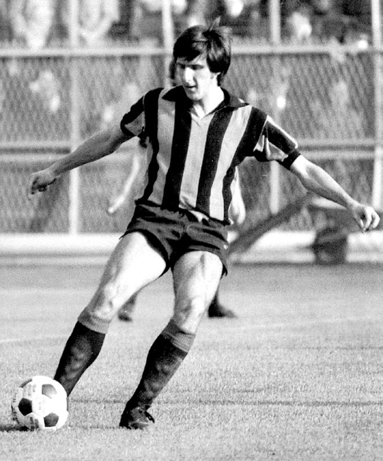 Il calciatore italiano Gaetano Scirea in azione all'Atalanta nella stagione 1972-73.